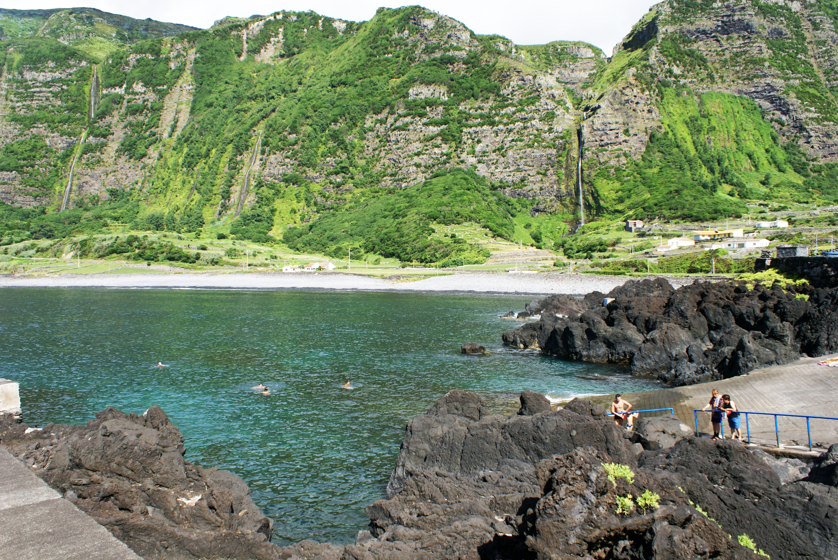 Porto e zona balnear da Fajã Grande, ilha das Flores, Açores, Arquivo de Villa Maria, ilha Terceira, Açores